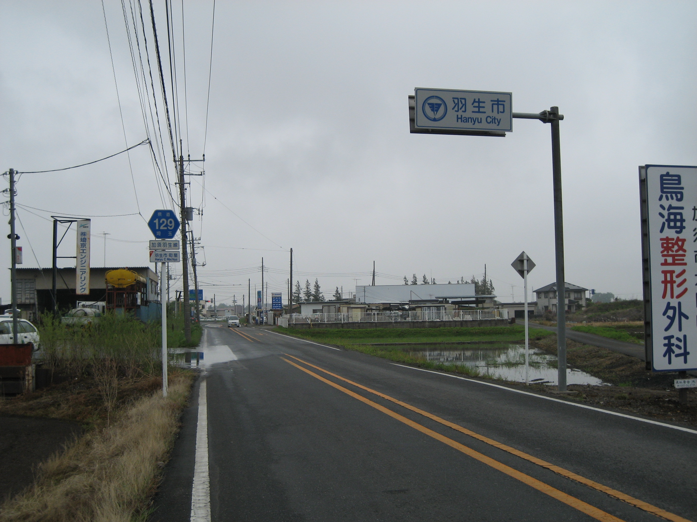 埼玉県道129号線羽生市内